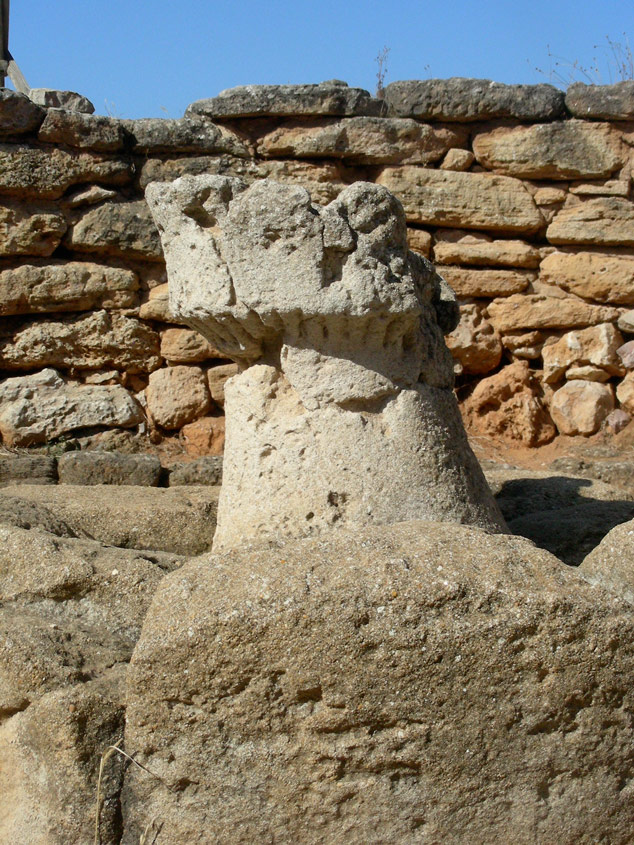 Italia, Sardegna, provincia di Sassari, Alghero, nuraghe e villaggio nuragico di Palmavera, recinto esterno del nuraghe, parte "pubblica", capanna delle riunioni, copia del modellino di torre nuragica in arenaria, sull'altare centrale